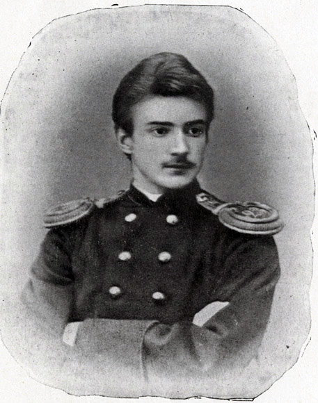 Шишко, Леонид Эммануилович (1854-1910) См. в: Памяти Леонида Эммануиловича Шишко. Б.м., Партия Социалистов-Революционеров, 1910, с. 50. (208/212)